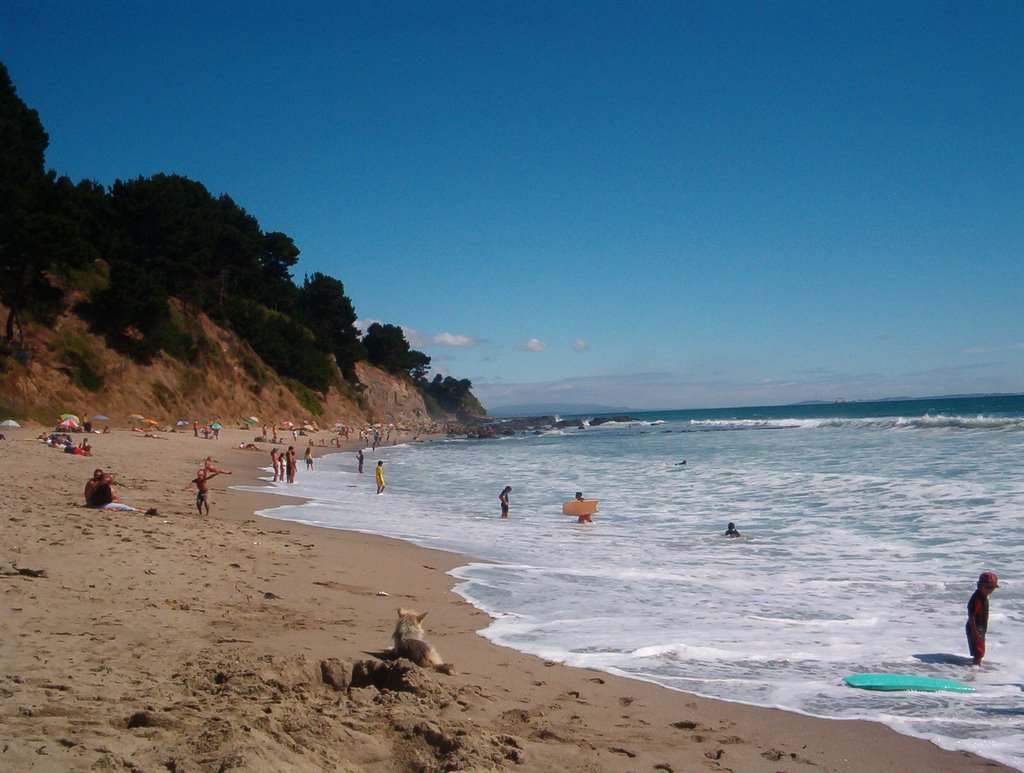 Playa caleta Chica, Cocholgue